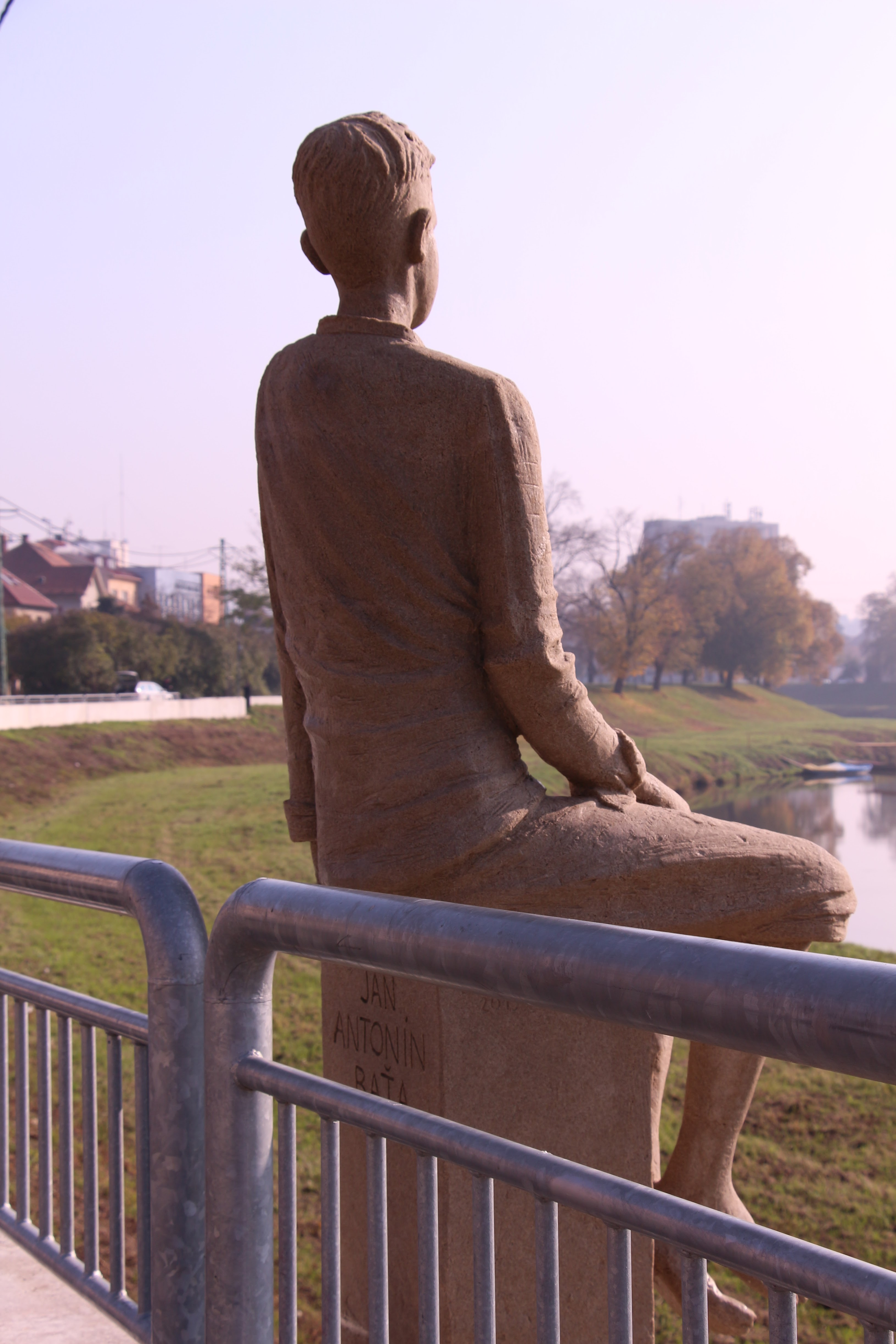 malý J.A.Bata